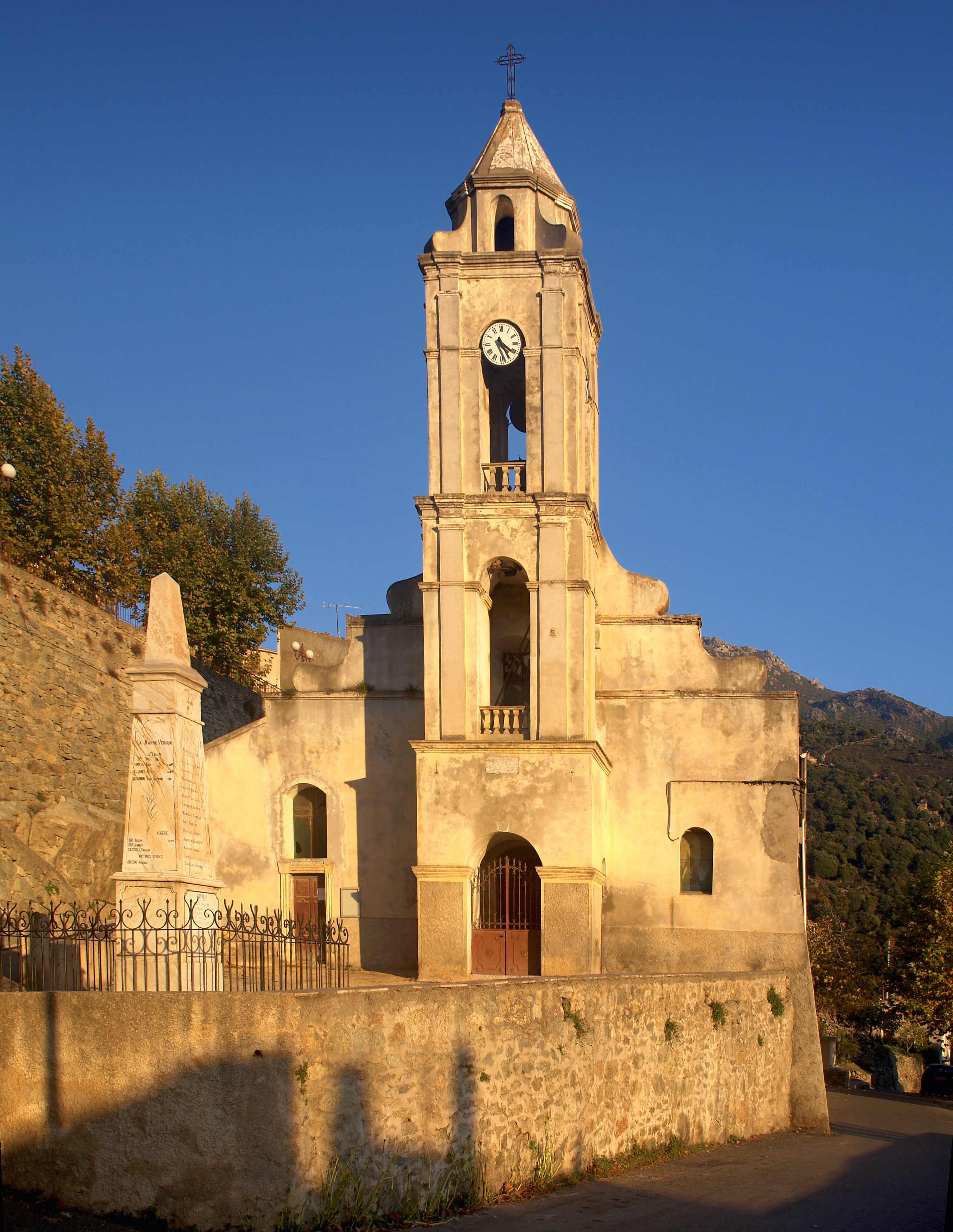 Pietralba (Corsica) - Église San Roccu (XVe s.)